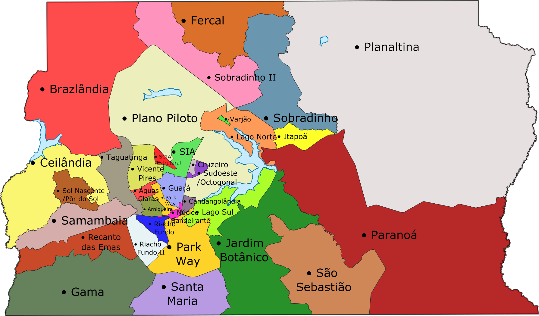 Limites das regiões administrativas do Distrito Federal, Brasil.(conforme a Lei Complementar nº 958, de 20 de dezembro de 2019)